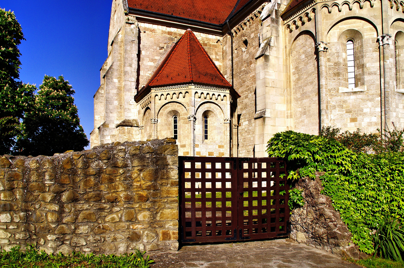 Református templom, volt premontrei prépostsági templom (Ócsa, Bercsényi u.) This is a photo of a monument in Hungary. Identifier: 7192